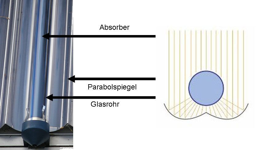 Vakuumröhre mit CPC Reflektor